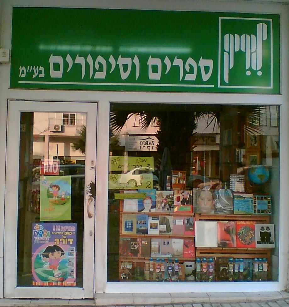 חנות הספרים "ליריק" ברמת השרון, שנסגרה היום לאחר 31 שנות פעילות. תודה לזיוה על האושר שהסבה לי ולתושבי רמת השרון. צילם דוד שי.